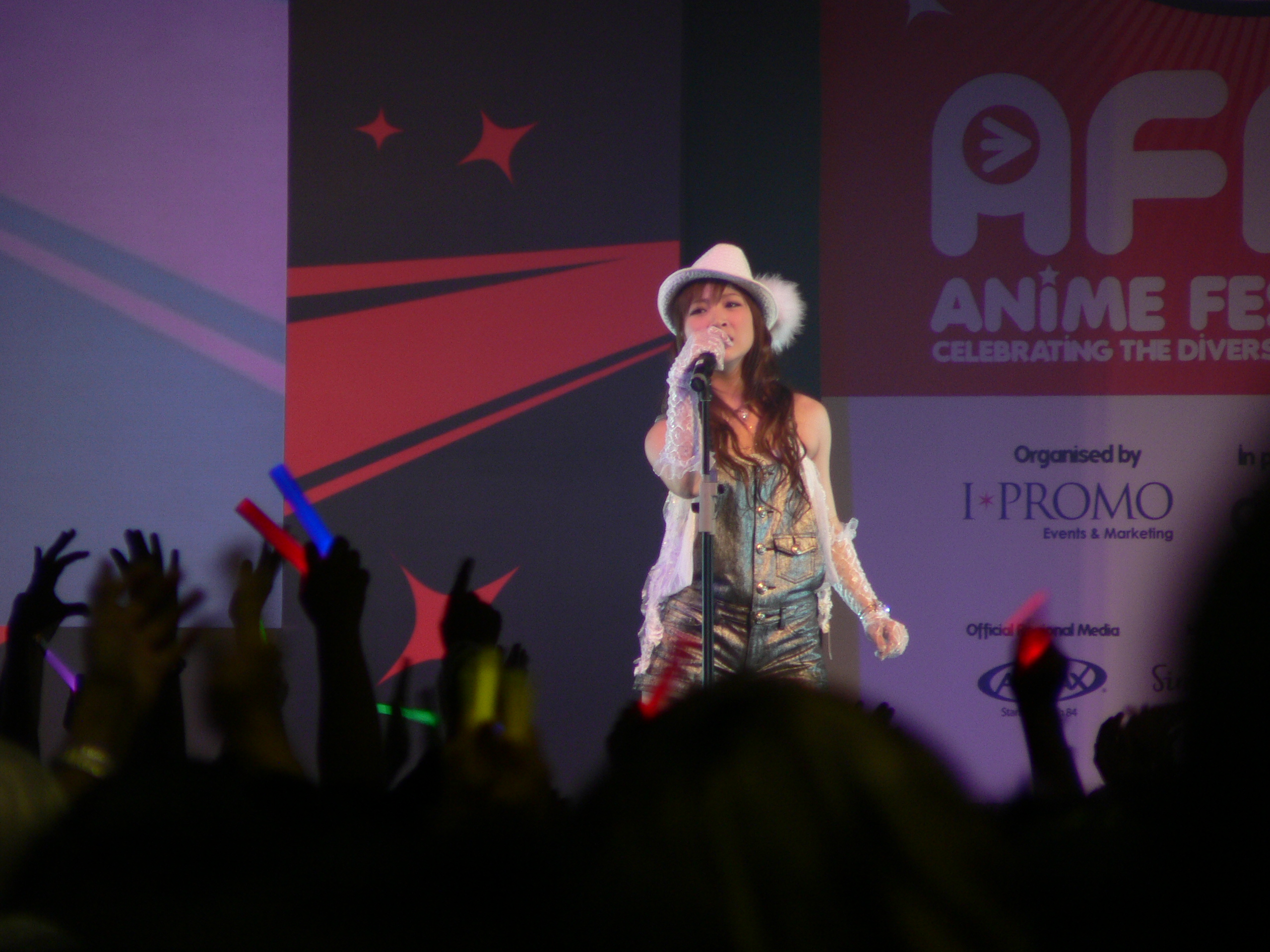 May'n 中林 芽依